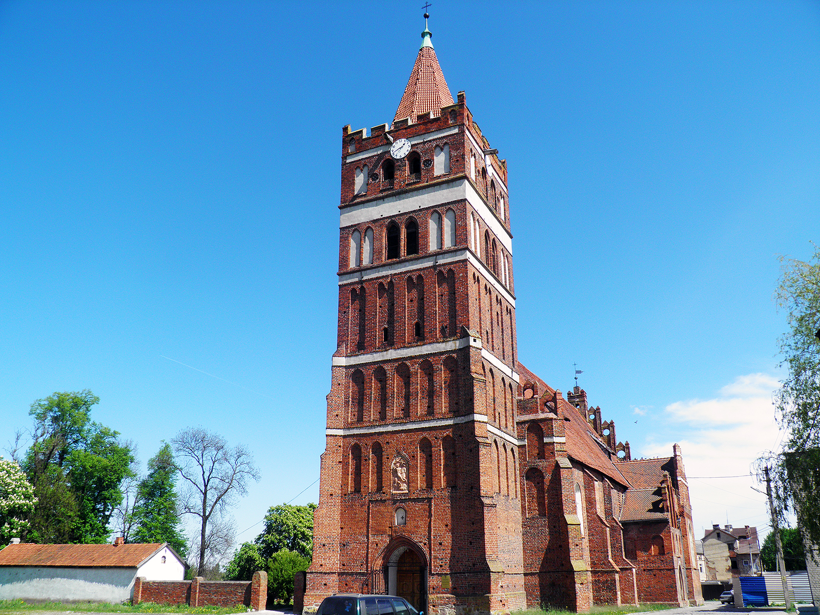 Кирха приходская (Калиниградская область, Правдинск, Столярная улица, 13)